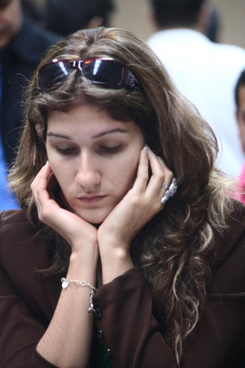 Lisandra Teresa Ordaz Valdés